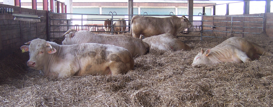 Charolais-Bullen im Freilaufstall (eigene Aufnahme)